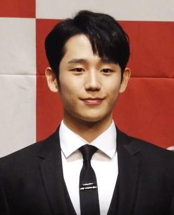 배우 한지민, 정해인이 20일 오후 서울 구로구 라마다 호텔에서 열린 MBC 드라마 '봄밤' 제작발표회에 참석했다.